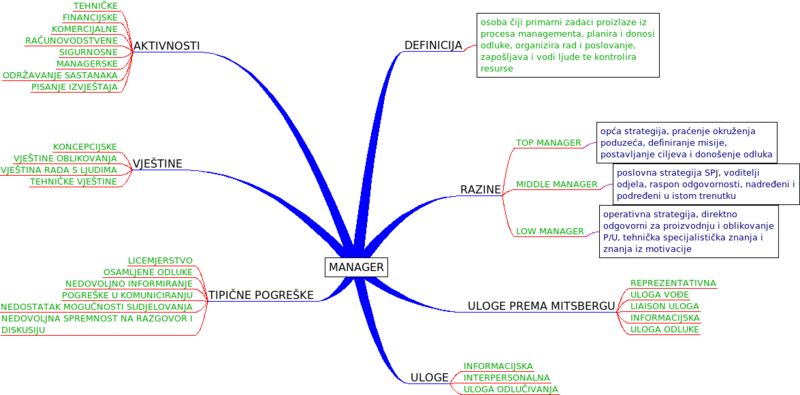 Mentalna mapa sa glavnim pojmovima vezana uz članak o managerima